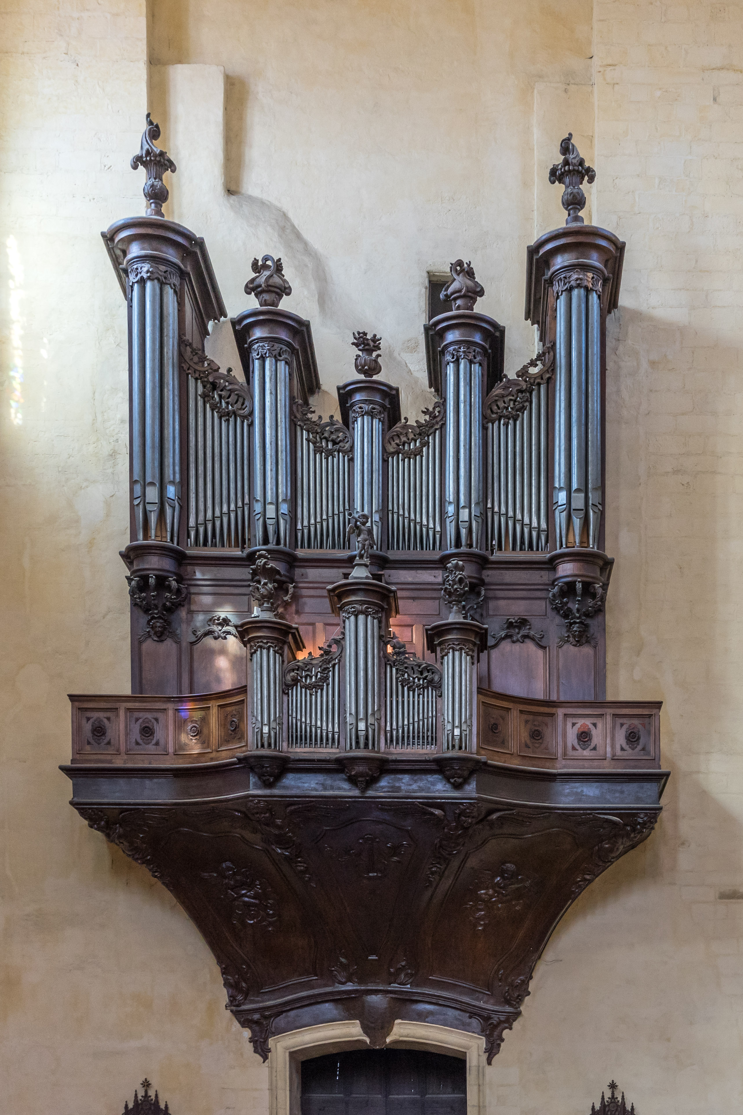 L'orgue en nid d'hirondelle, de Jean-François L'Épine (1752).